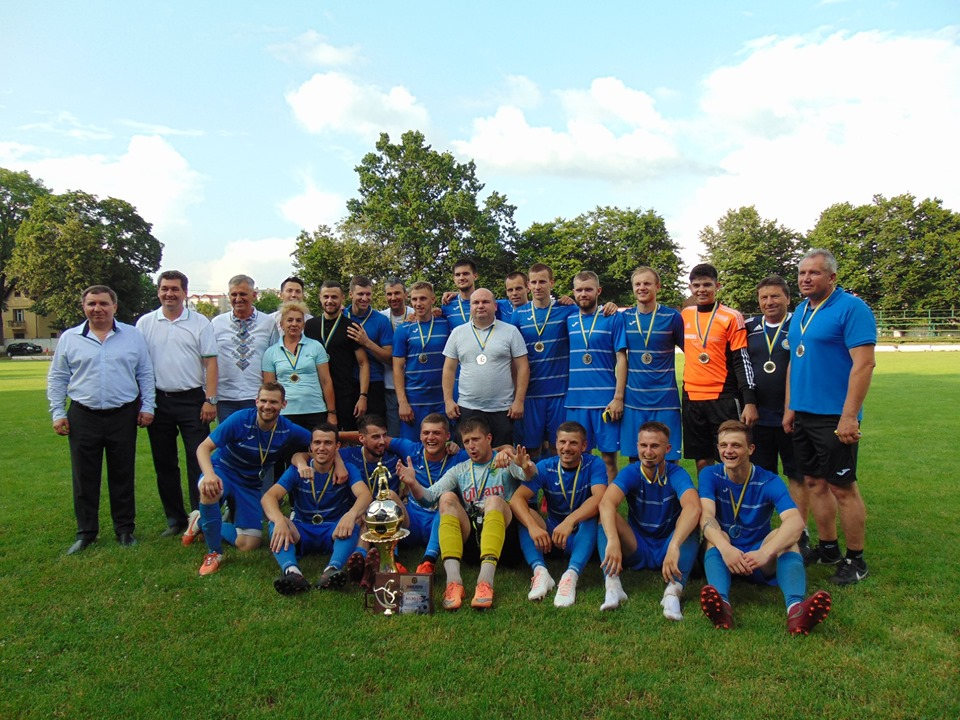 фото з кубкового матчу карпати-вихор